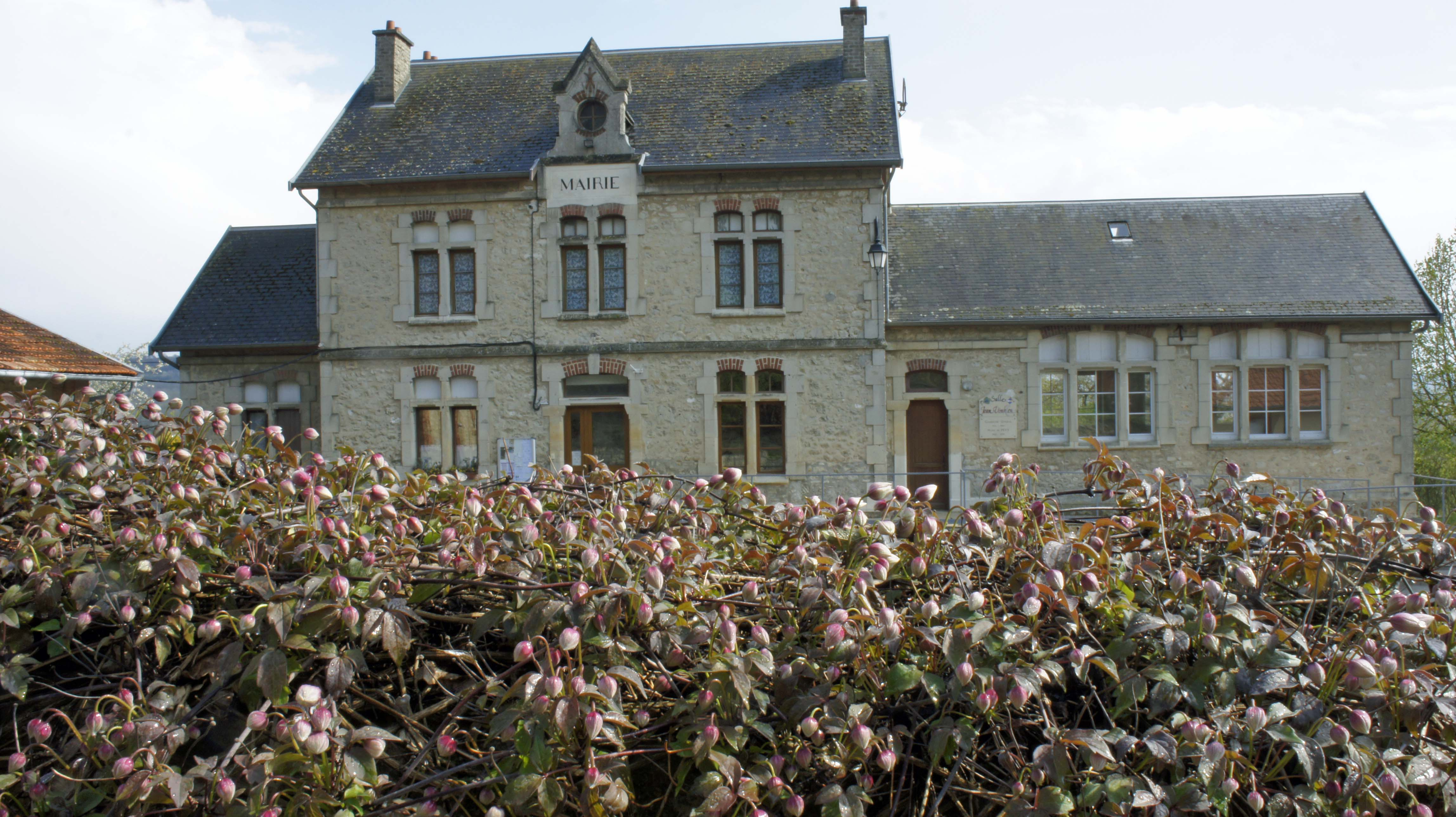 Mairie de Pévy.